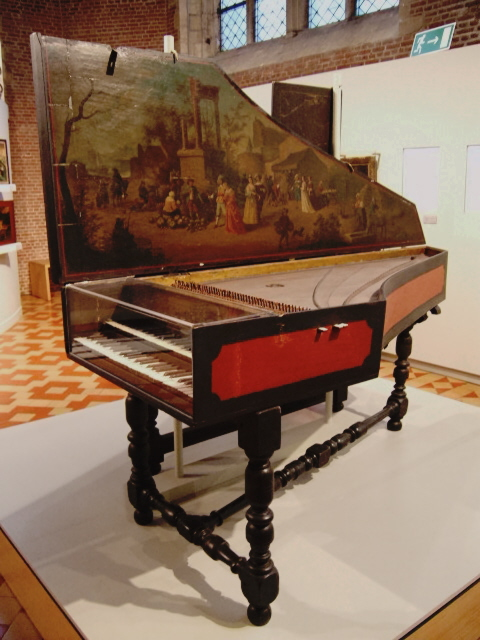 Clavecin par Joris Britsen (Anvers, 1680) - Anvers, Vleeshuis Museum